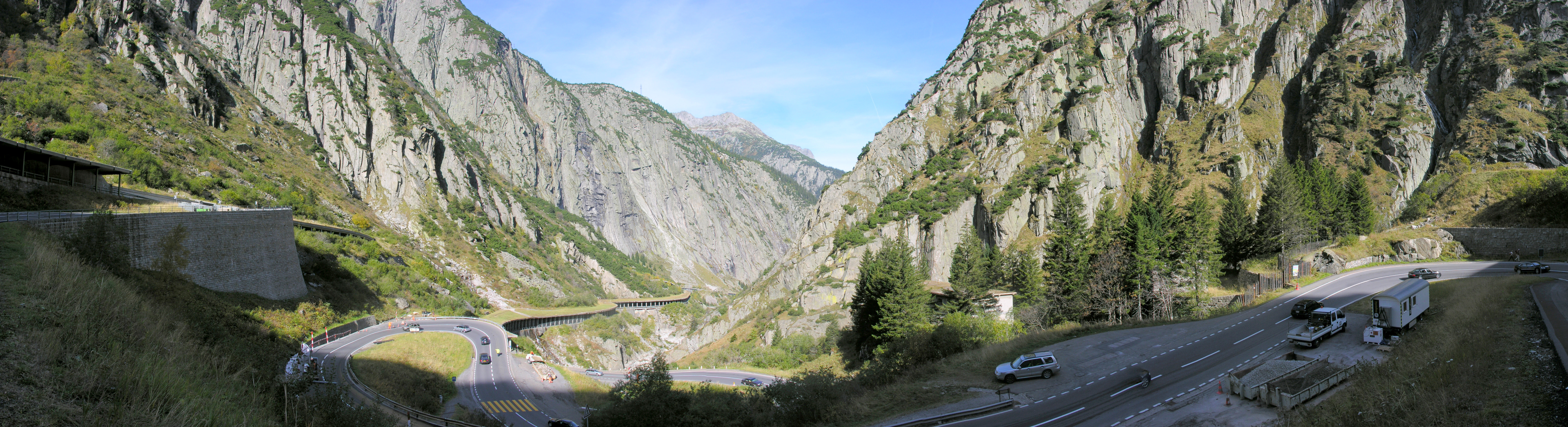 Switzerland, Uri, Schöllenen